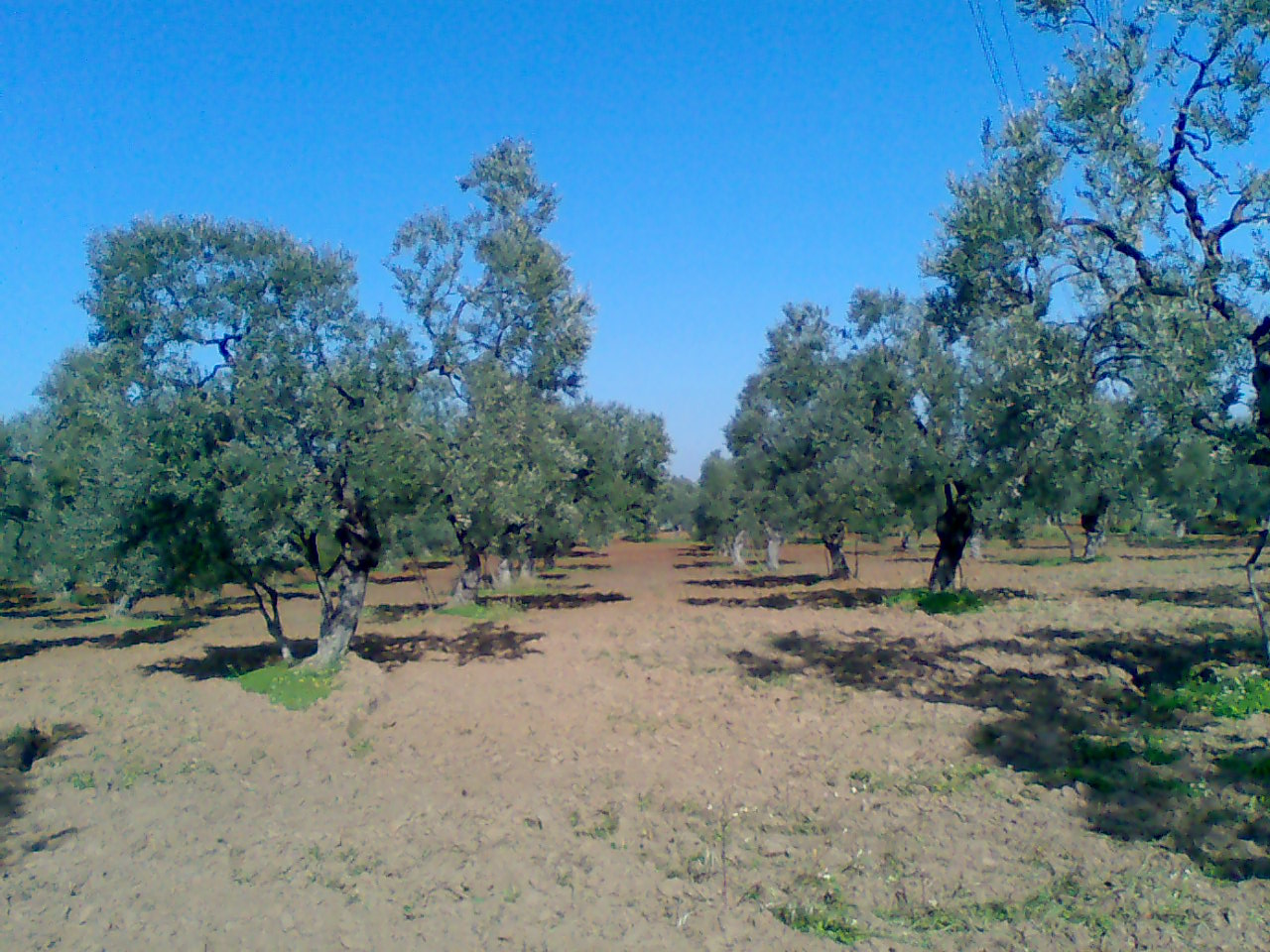 Olivar en Dos Hermanas